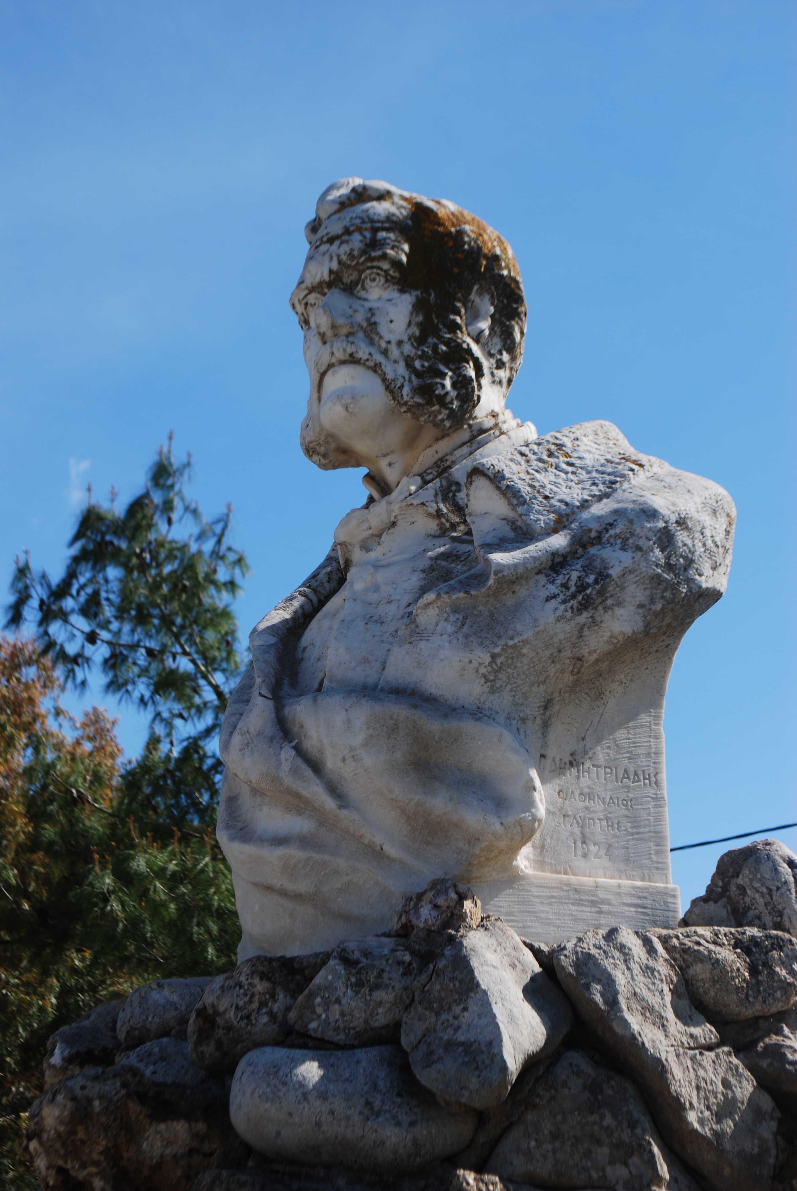 Vue de Lefkada.